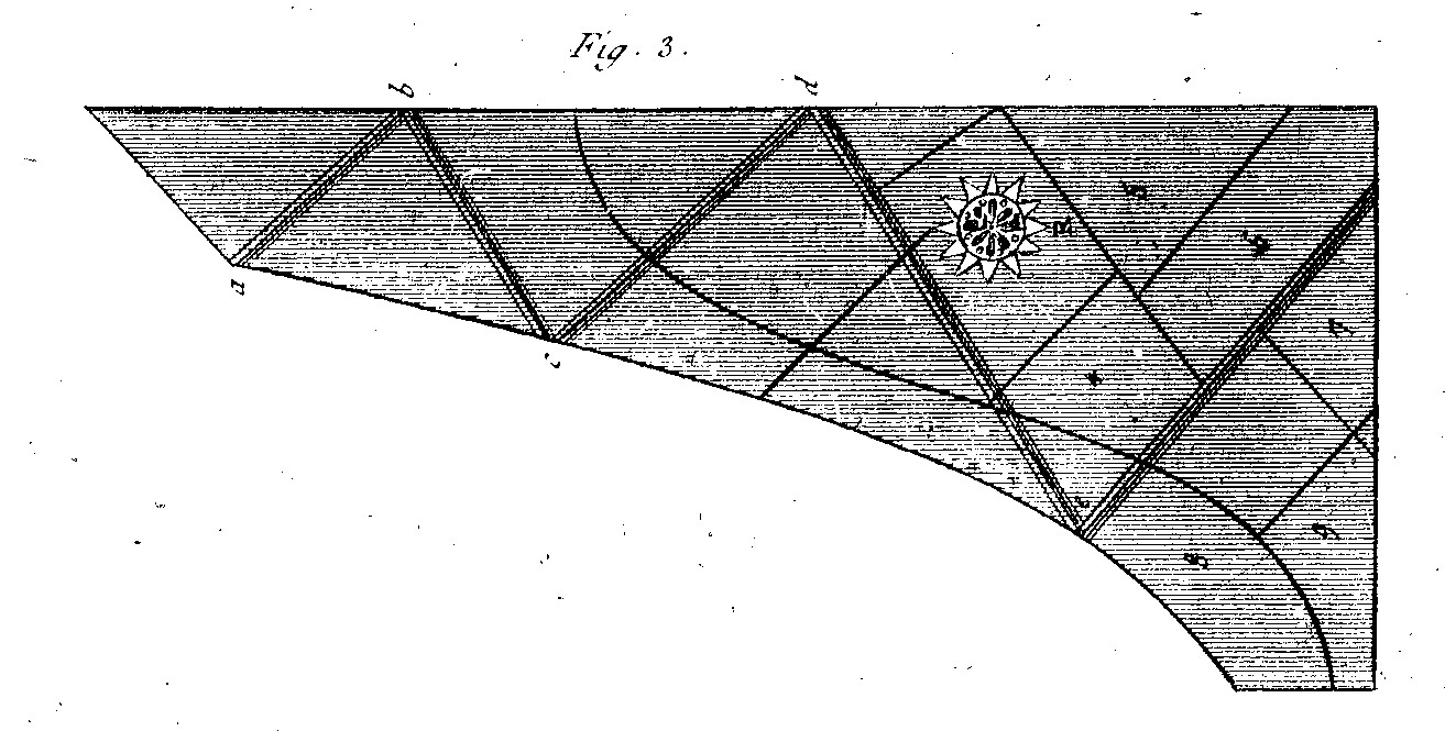 Planches de l'Encyclopédie de Diderot et d'Alembert, volume 4.